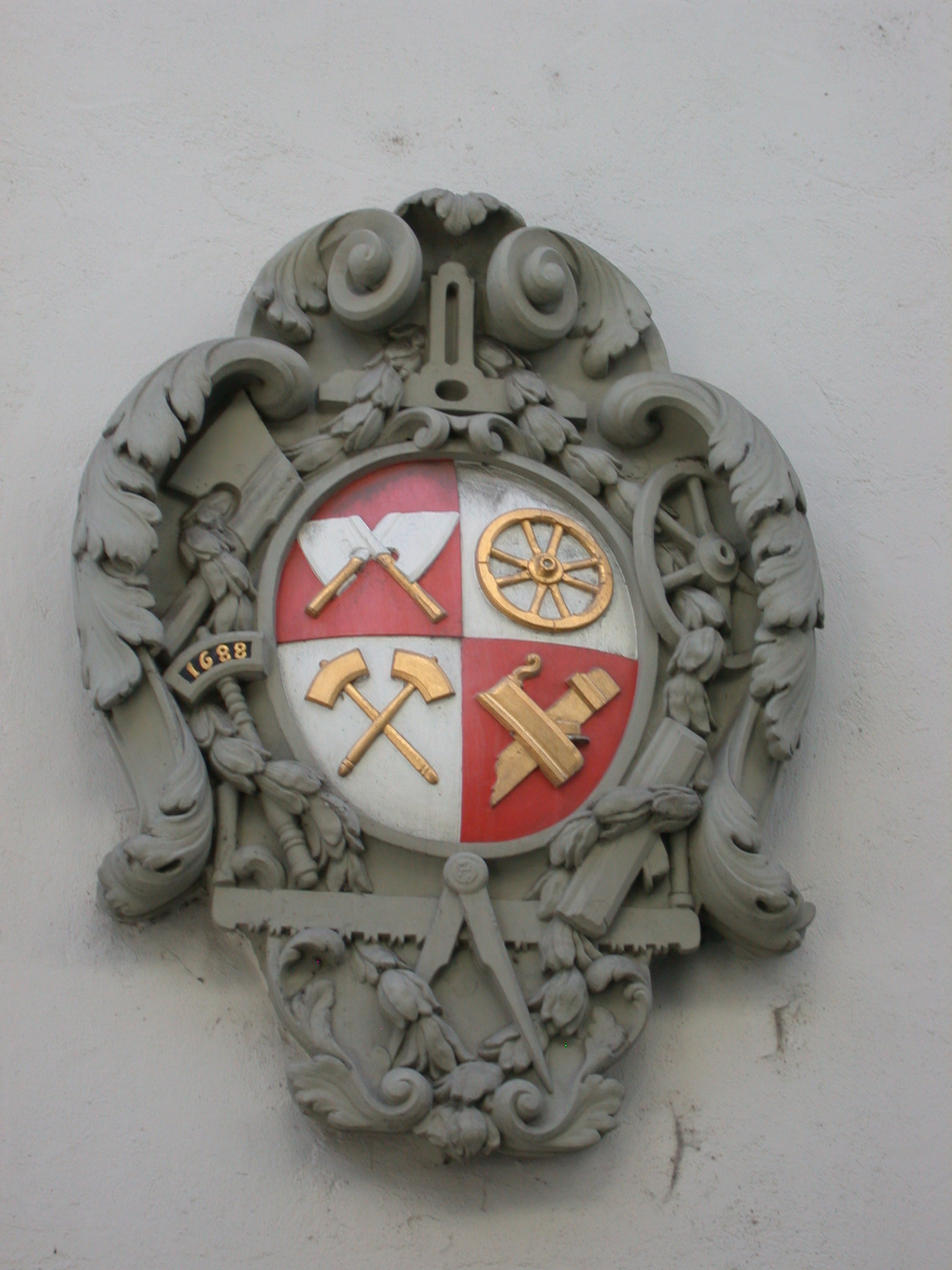 Wappen der Zunft zu Zimmerleuten an deren Zunfthaus an der Kramgasse 2.